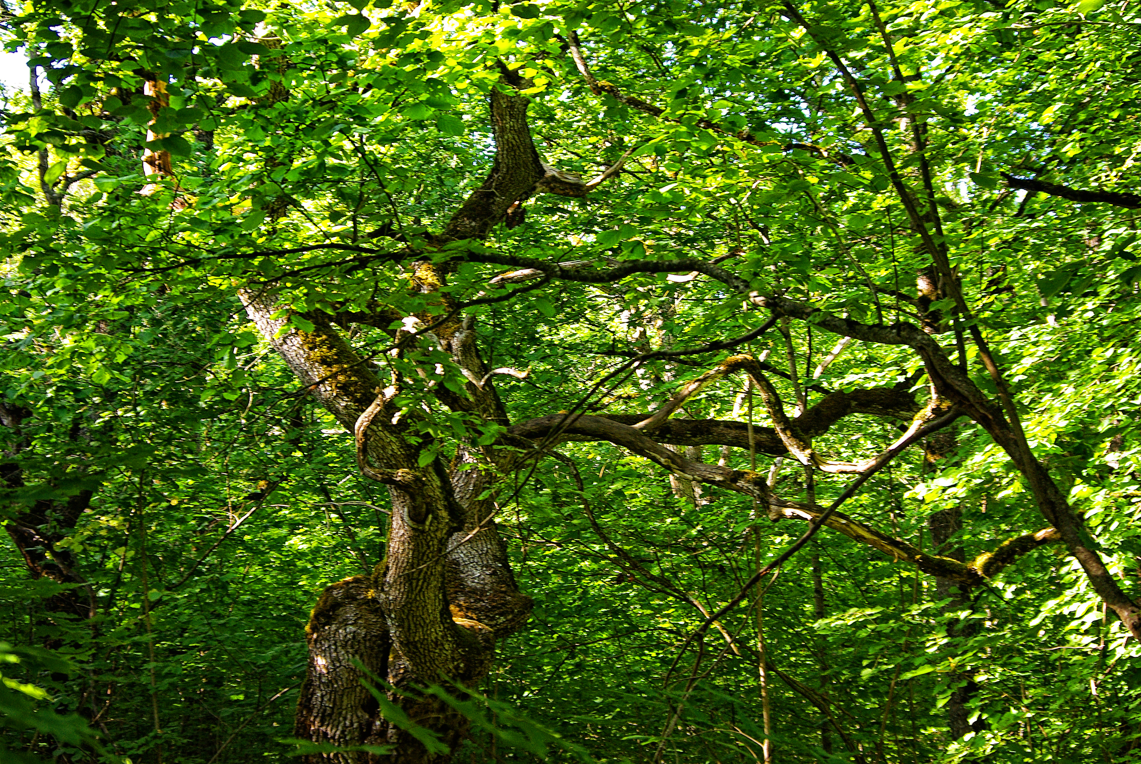 Rakvere tammik, Rakvere tammiku MKA